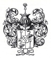 Het wapen De Graeff van Polsbroek als heren van Purmerland en Ilpendam (1678-1870)